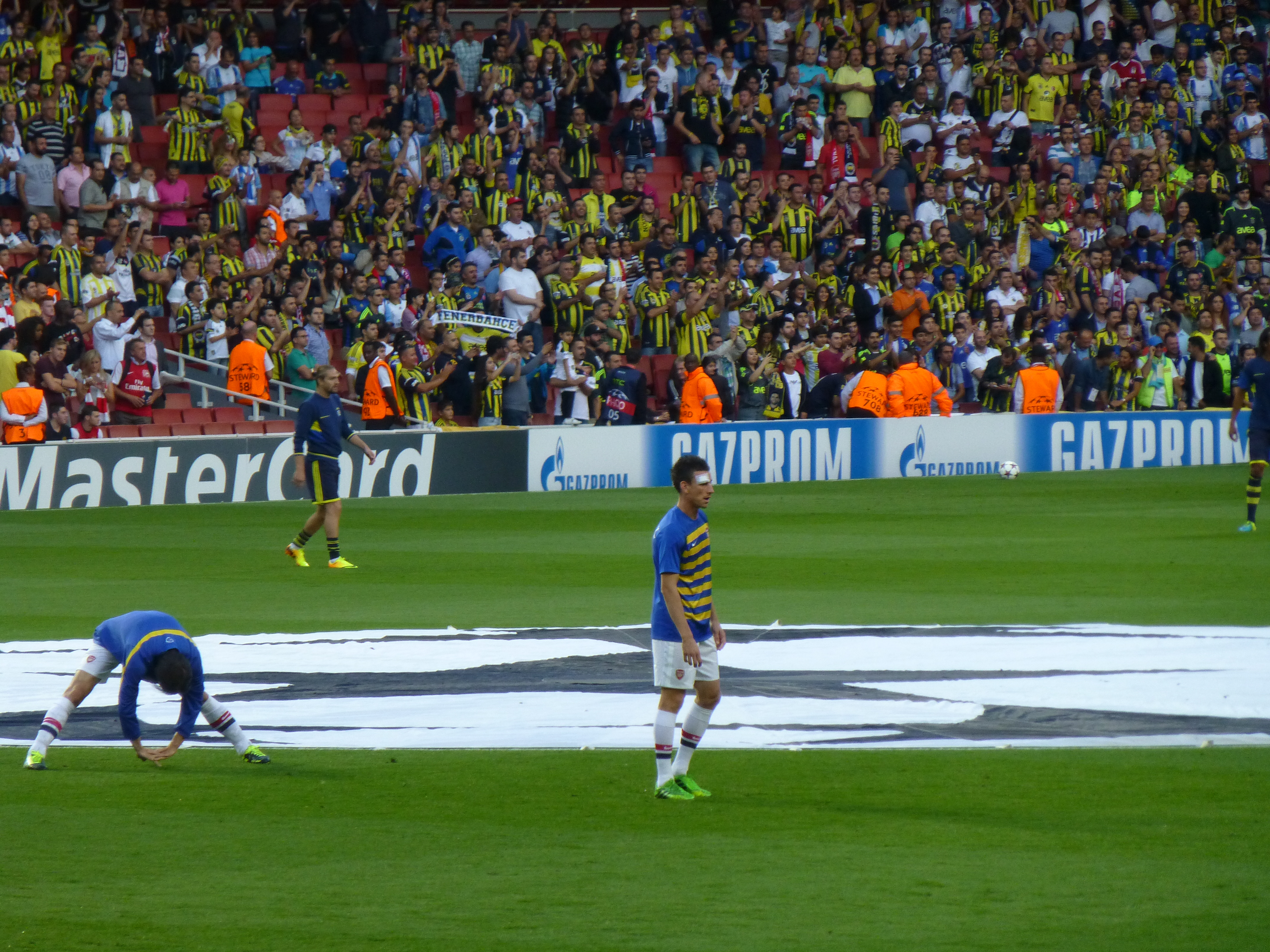 Laurent Koscielny